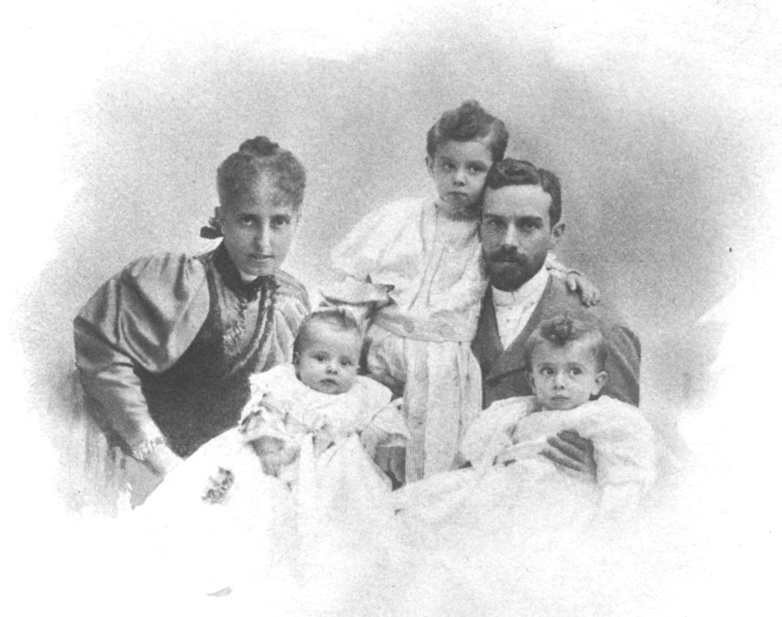 Familia de Enric Sagnier (1892).